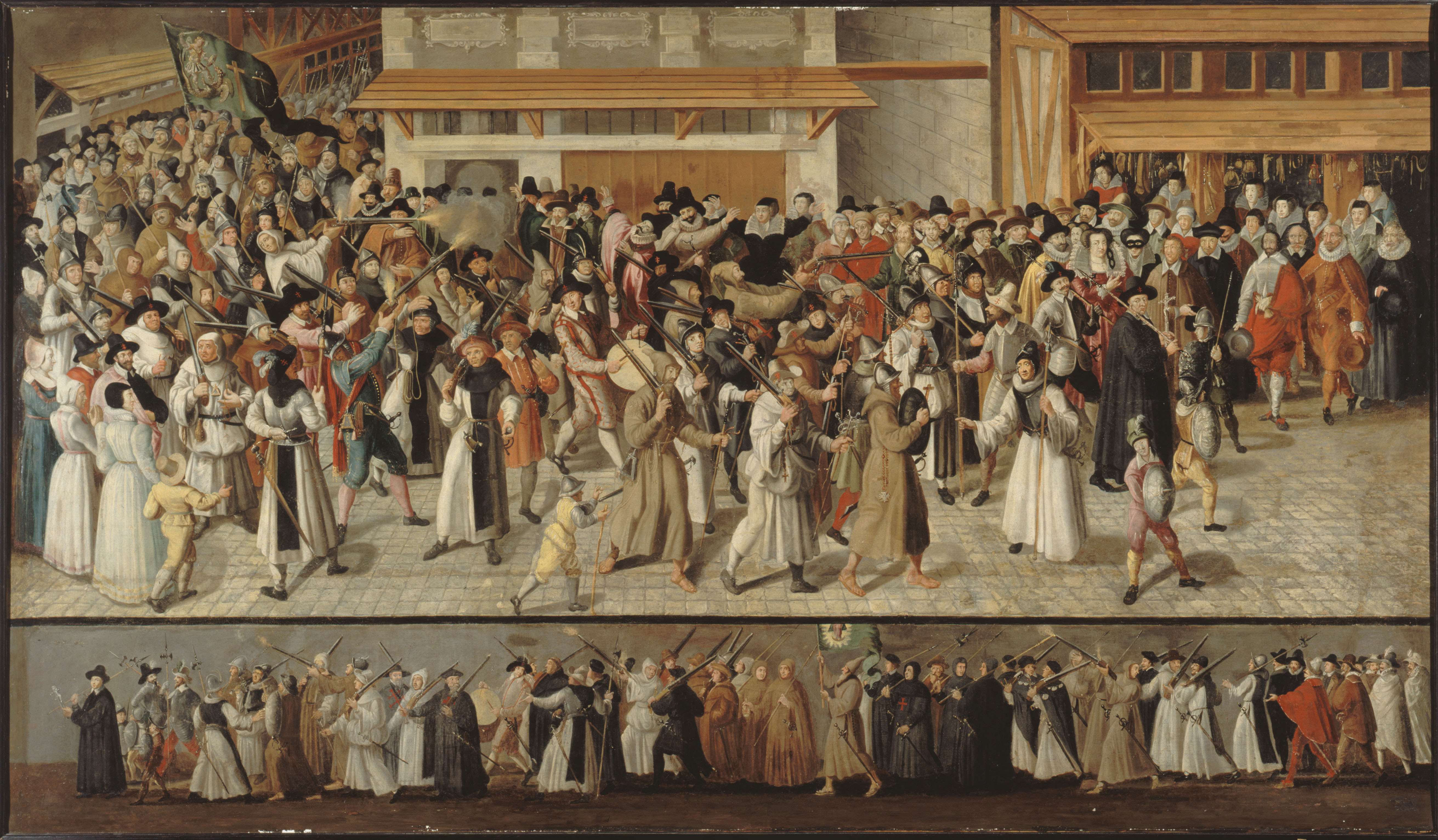 Procession de la Ligue dans l'île de la Cité, peinture anonyme de la fin du XVIe siècle